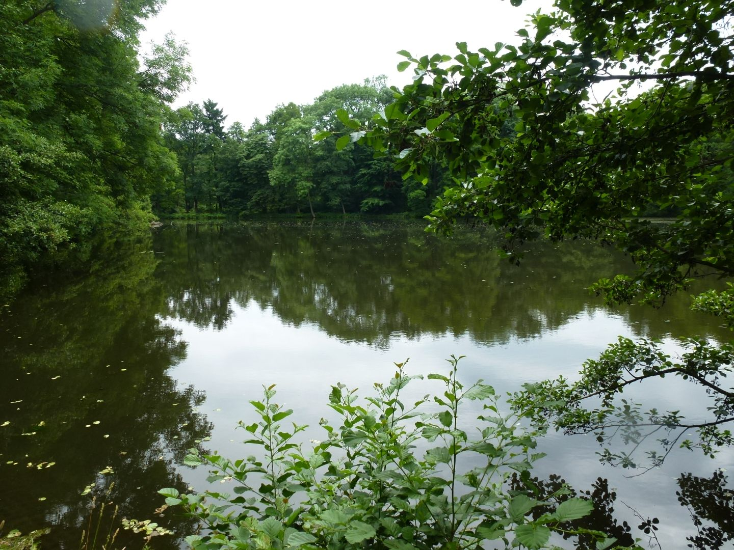 Teich in Börln